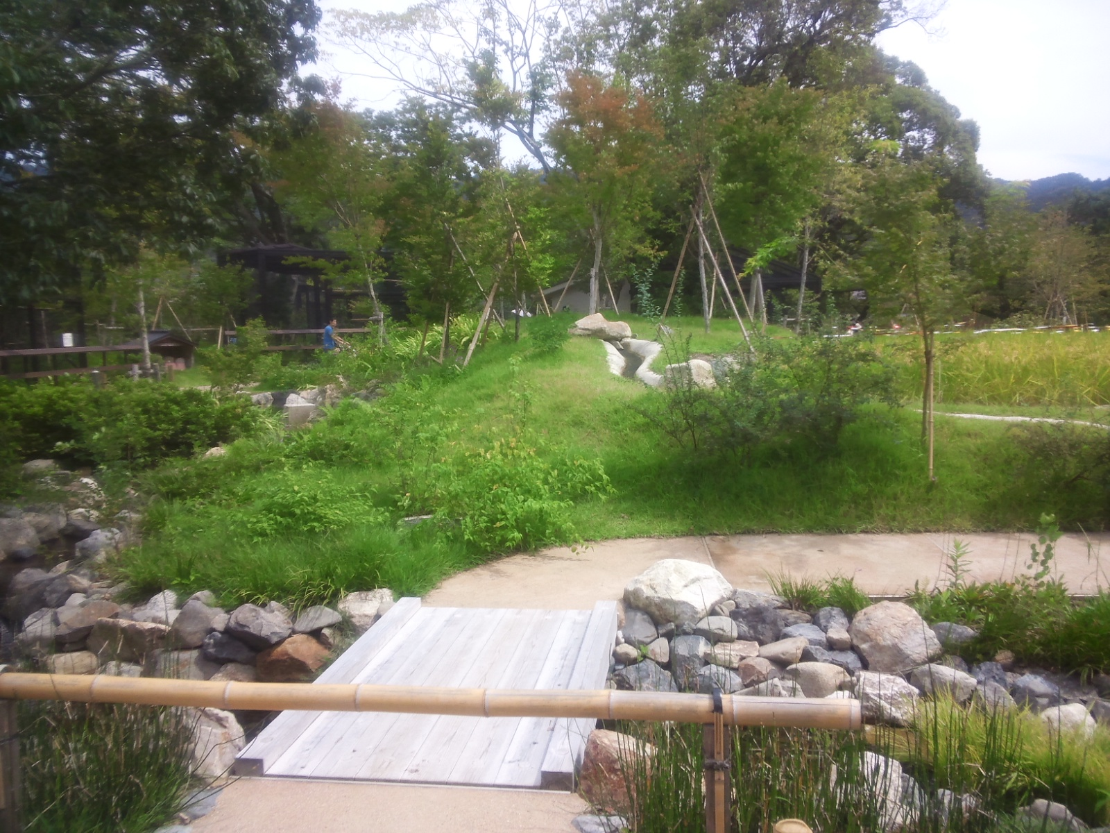 京都市動物園 - 京都の森